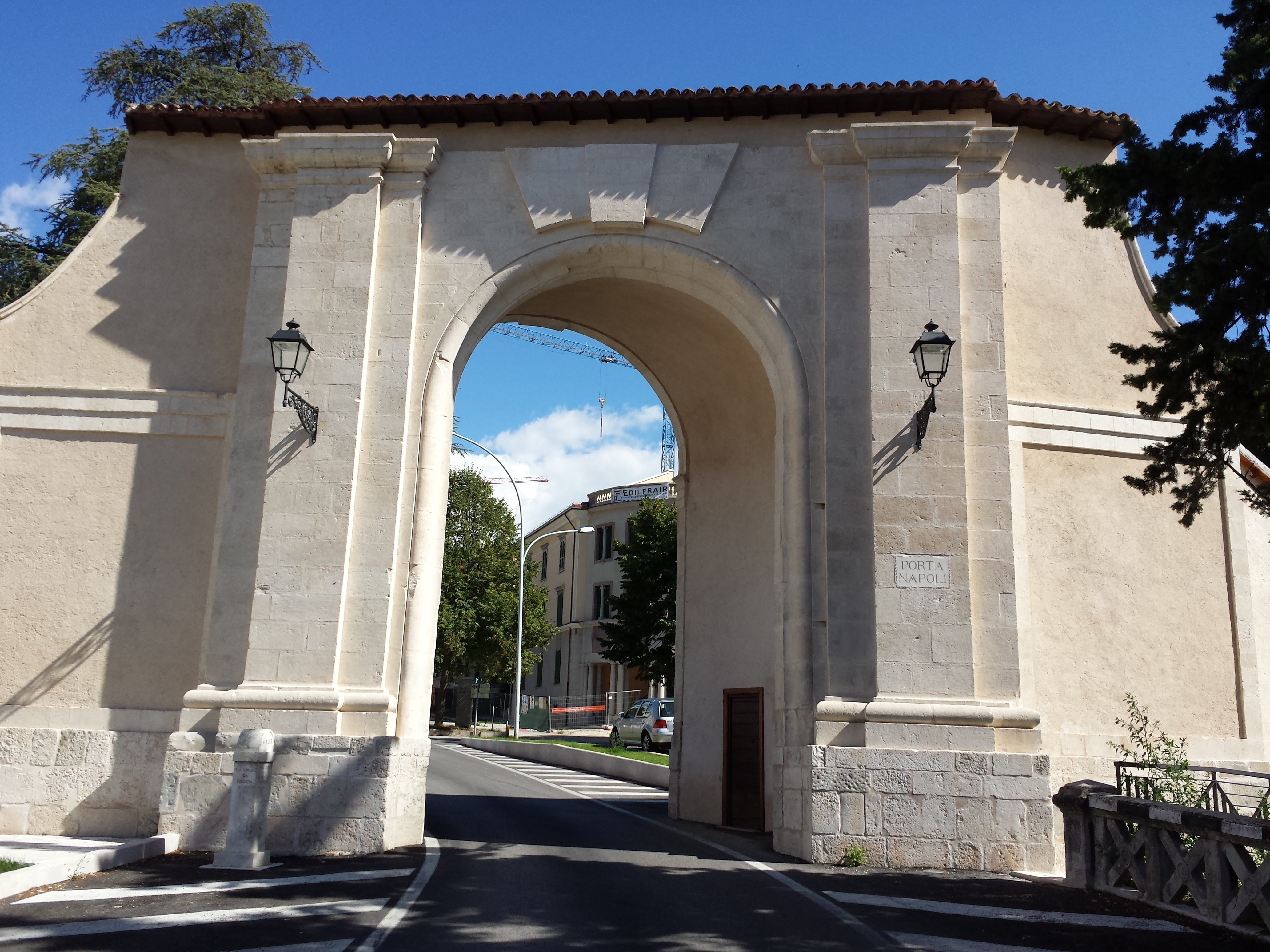 L'Aquila: Porta Napoli